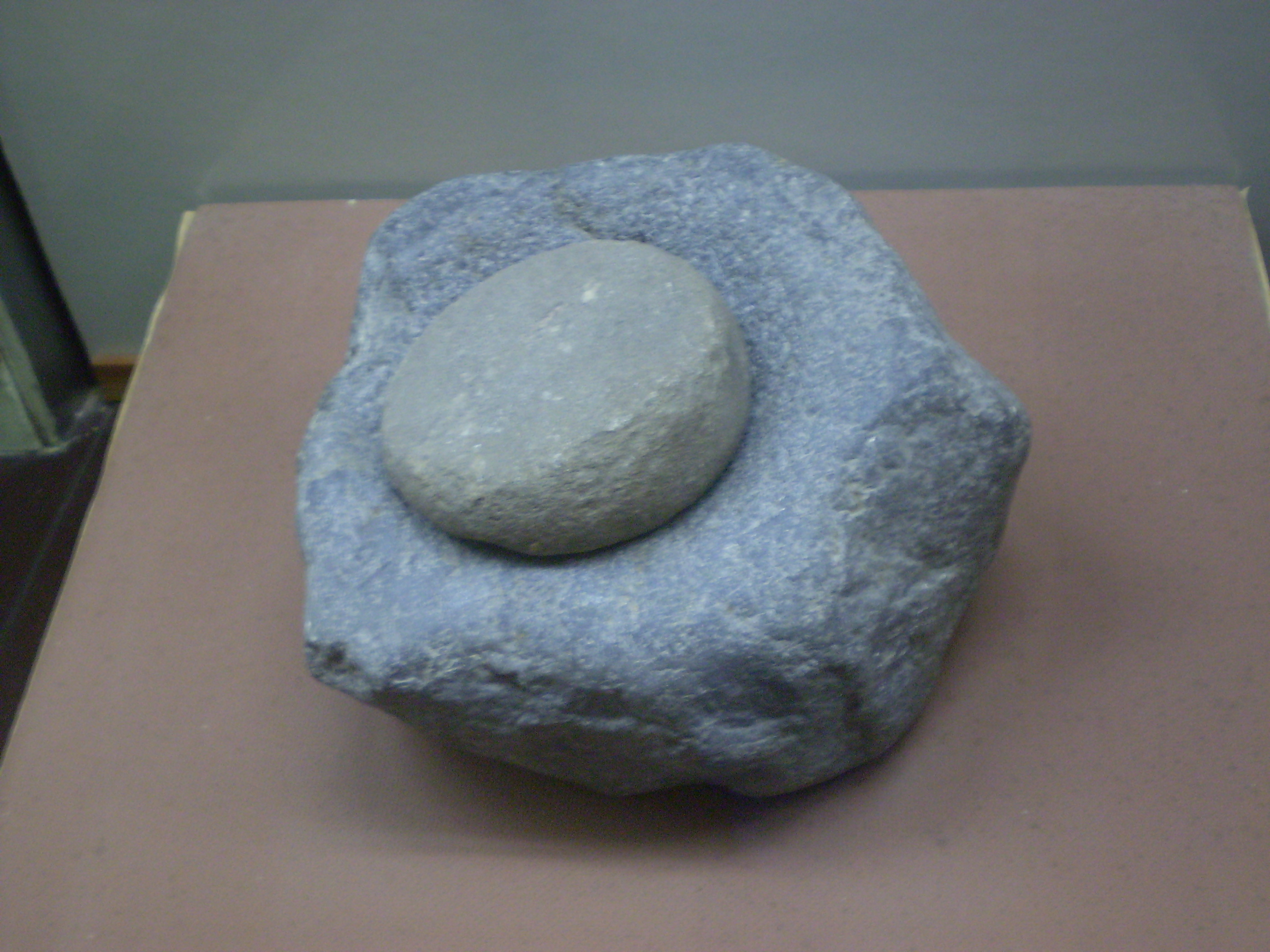 Mortero recolectado de las excavaciones efectuadas en la gruta de Intihuasi, actual provincia de San Luis. Museo de La Plata